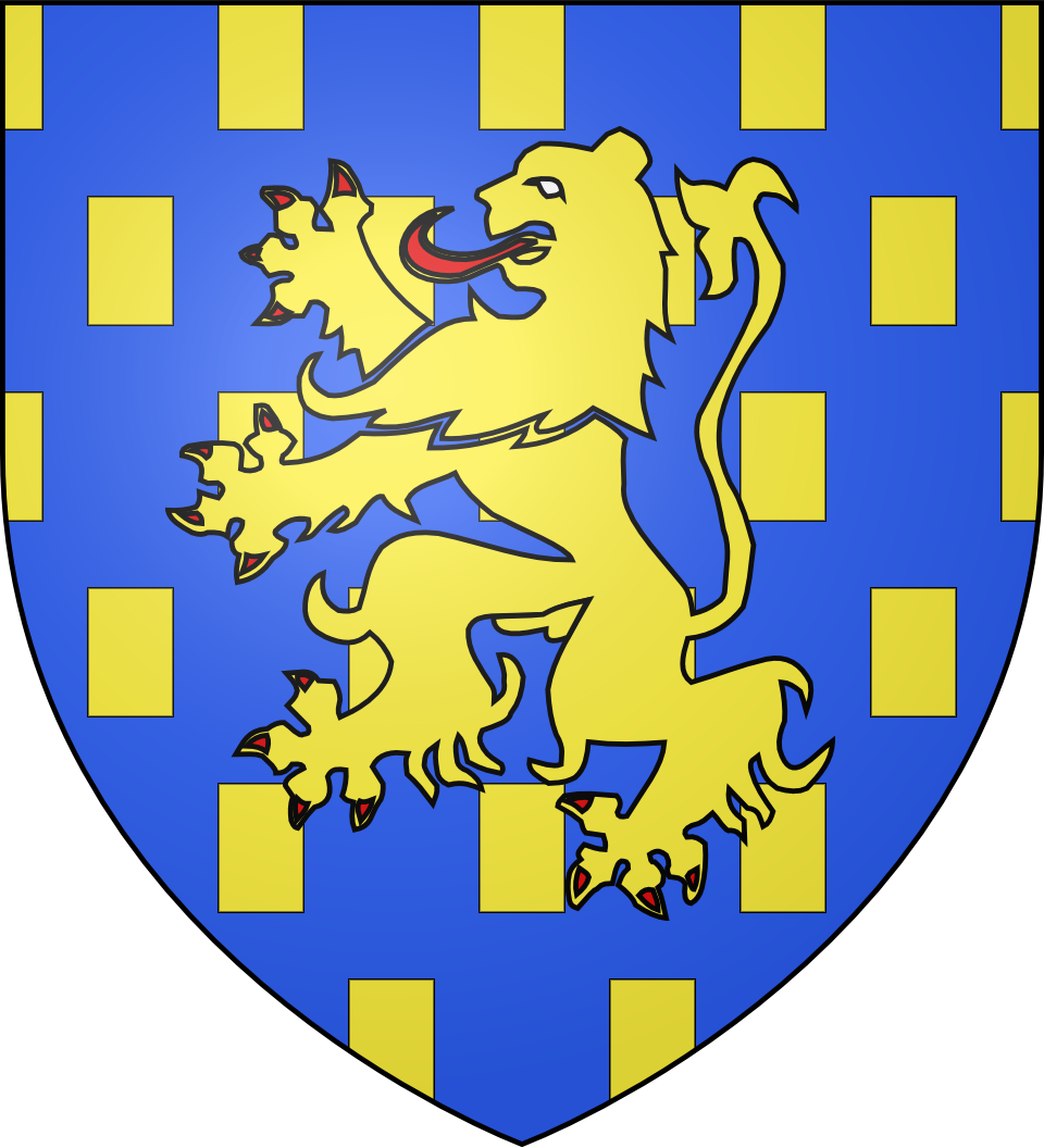 Blason de la ville de Clamecy (Nièvre) : D'azur semé de billettes d'or au lion du même, armé et lampassé de gueules, brochant sur le tout